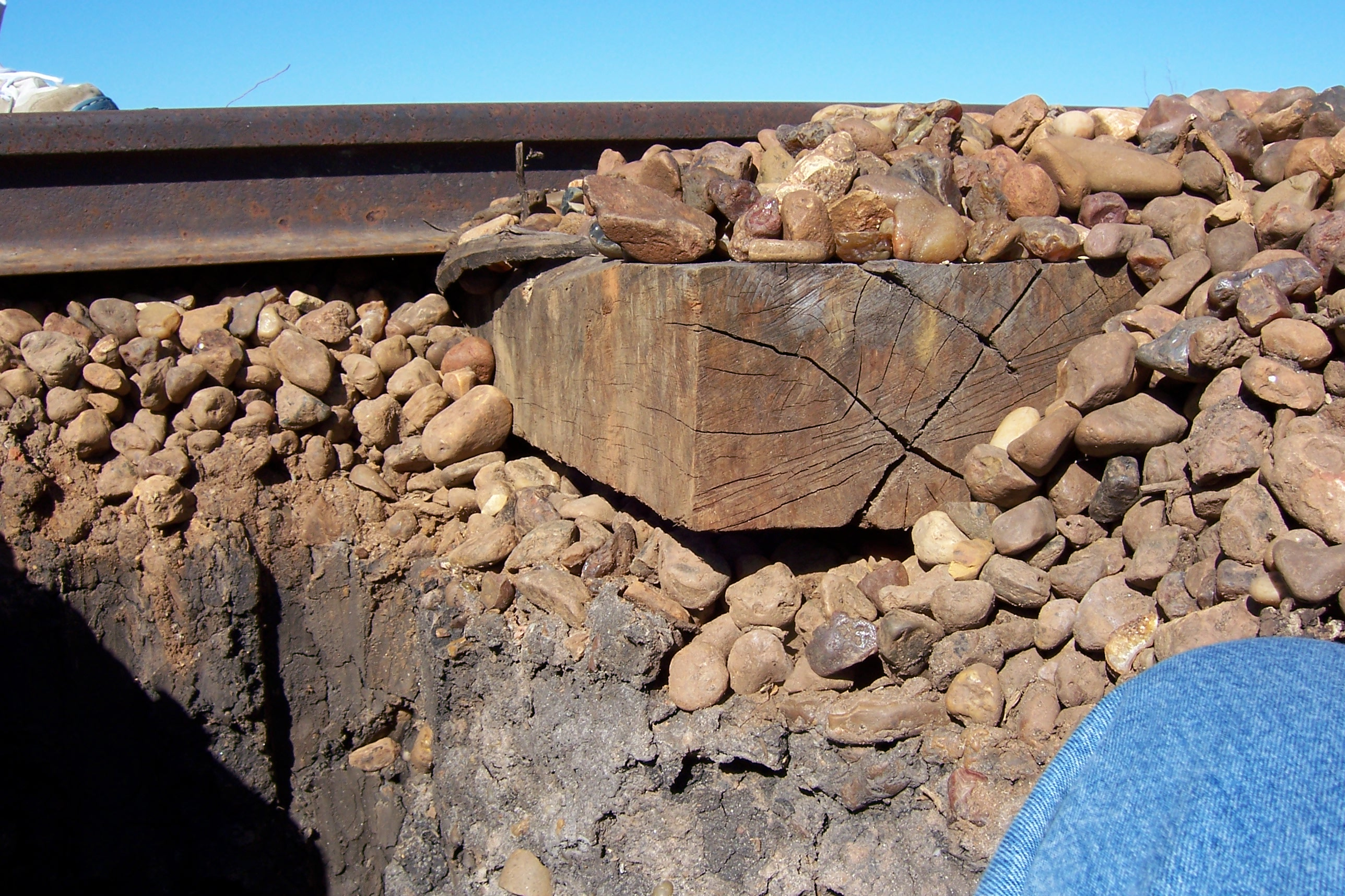 Vía sobre durmientes de madera de eucalipto, con balasto de canto rodado, en desvío secundario para carga de arroz en Salto, Uruguay. Foto tomada durante la realización de cateos, se observa la capa de piedra debajo del durmiente.